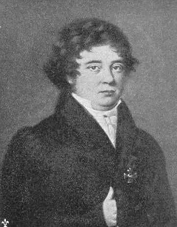 Israel Hwasser. Ur verket "Finland i ord och bild" av O. M. Reuter, tryckt i Stockholm 1901, sidan 387.